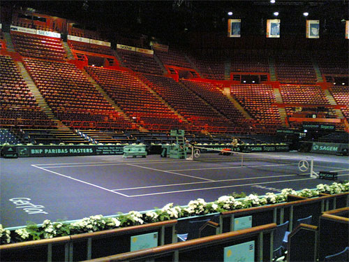 Quelques photos du match opposant Paul Henri Mathieu à Davide Sanguinetti lors de l'open de Tennis de Paris Bercy 2005. Photos du Village de Paris et des coulisses de la compétition